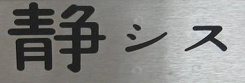 JR東海 静岡支社 静岡車両区